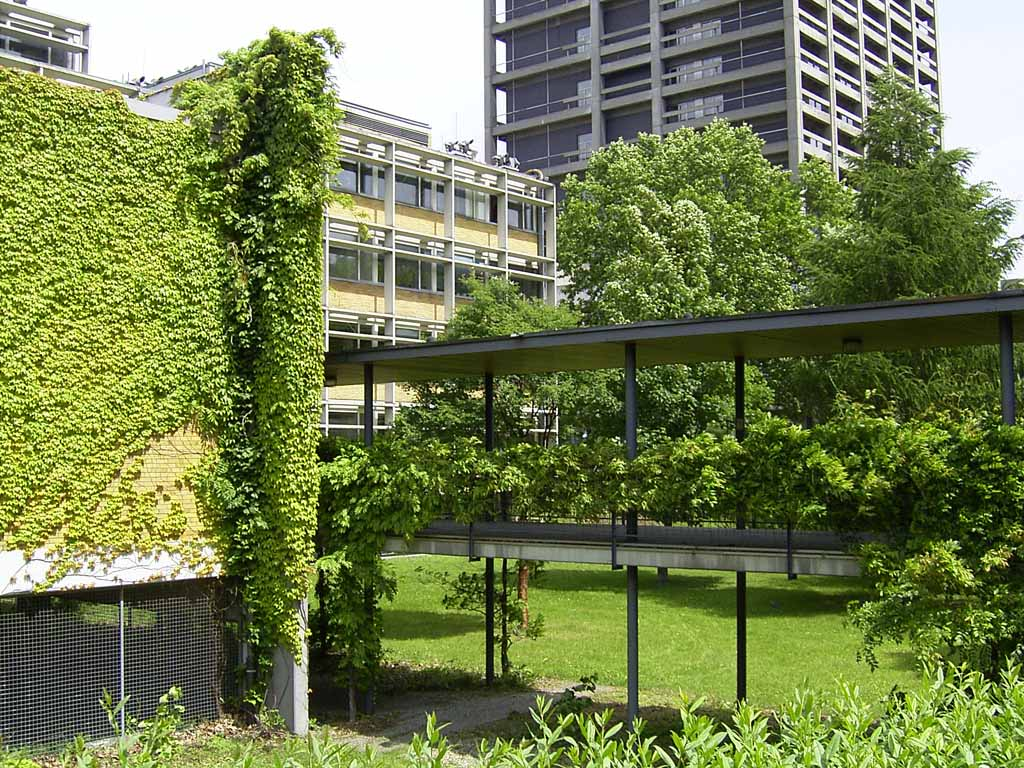 Institutsgebäude Georg-Voigt-Straße von Ferdinand Kramer - Im Hintergrund der AfE-Turm